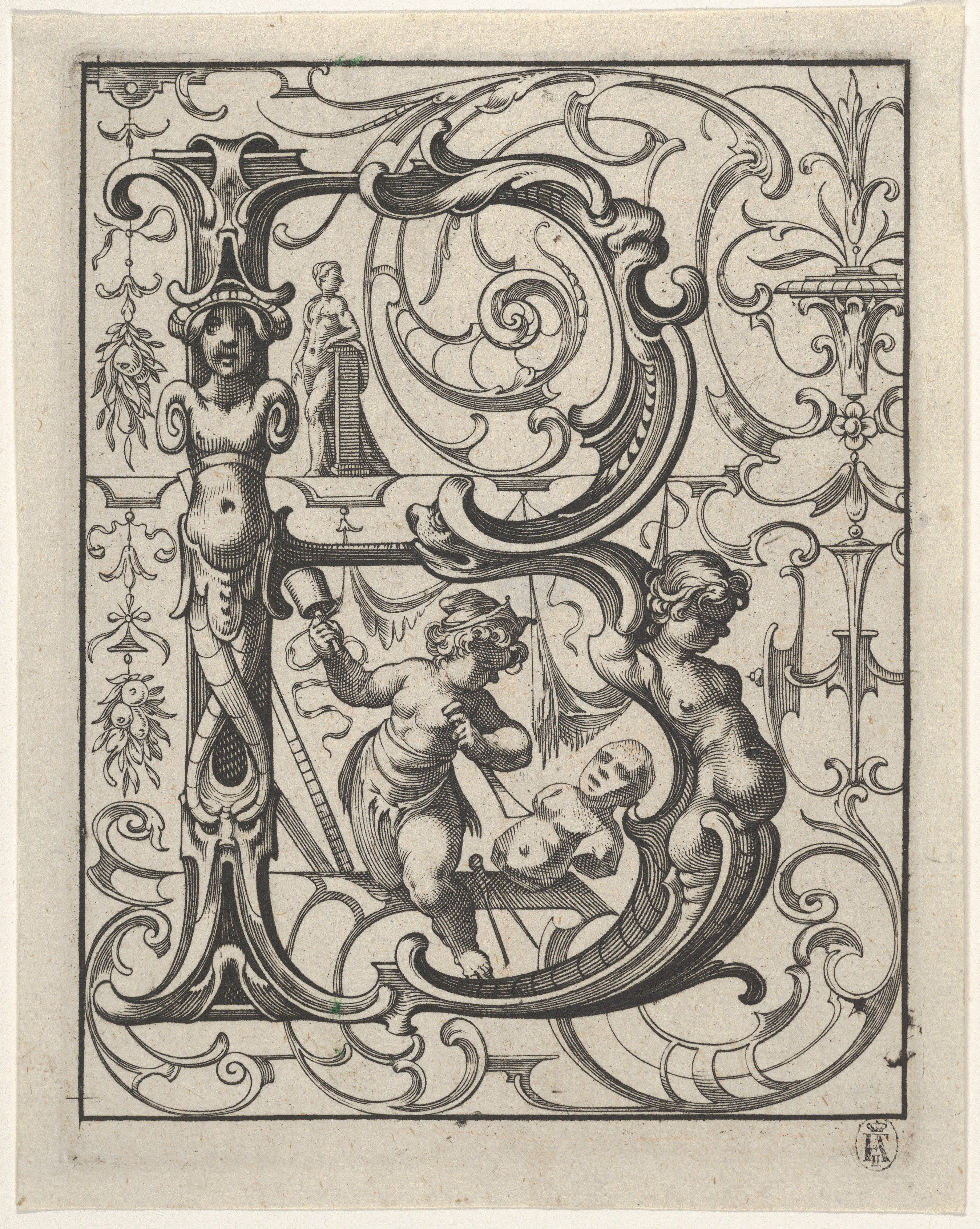 Book; Books